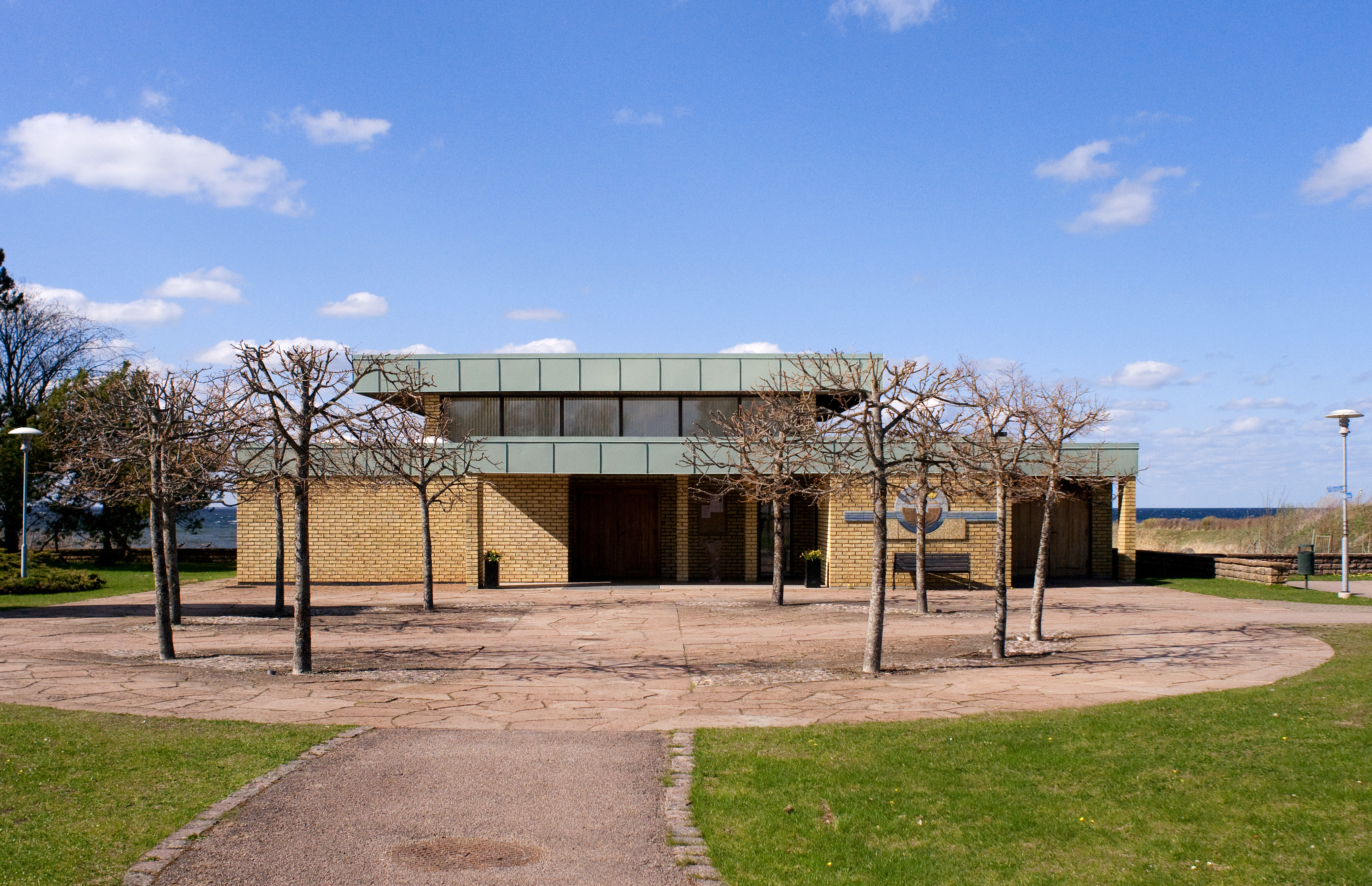 Sankt Elavi kapell i Borgholm.